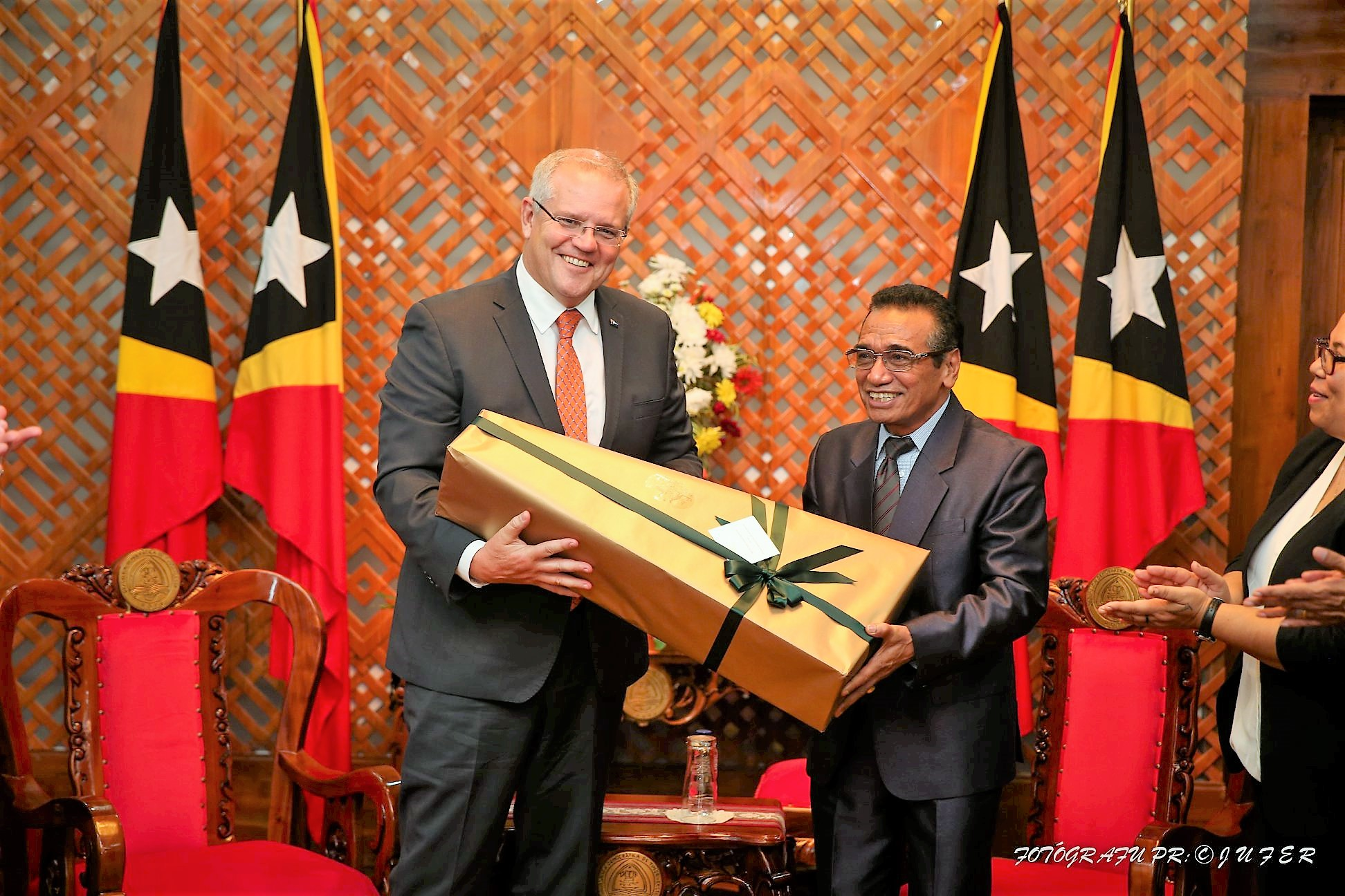 Australiens Premierminister Scott Morrisson besucht Osttimors Präsident Francisco Guterres